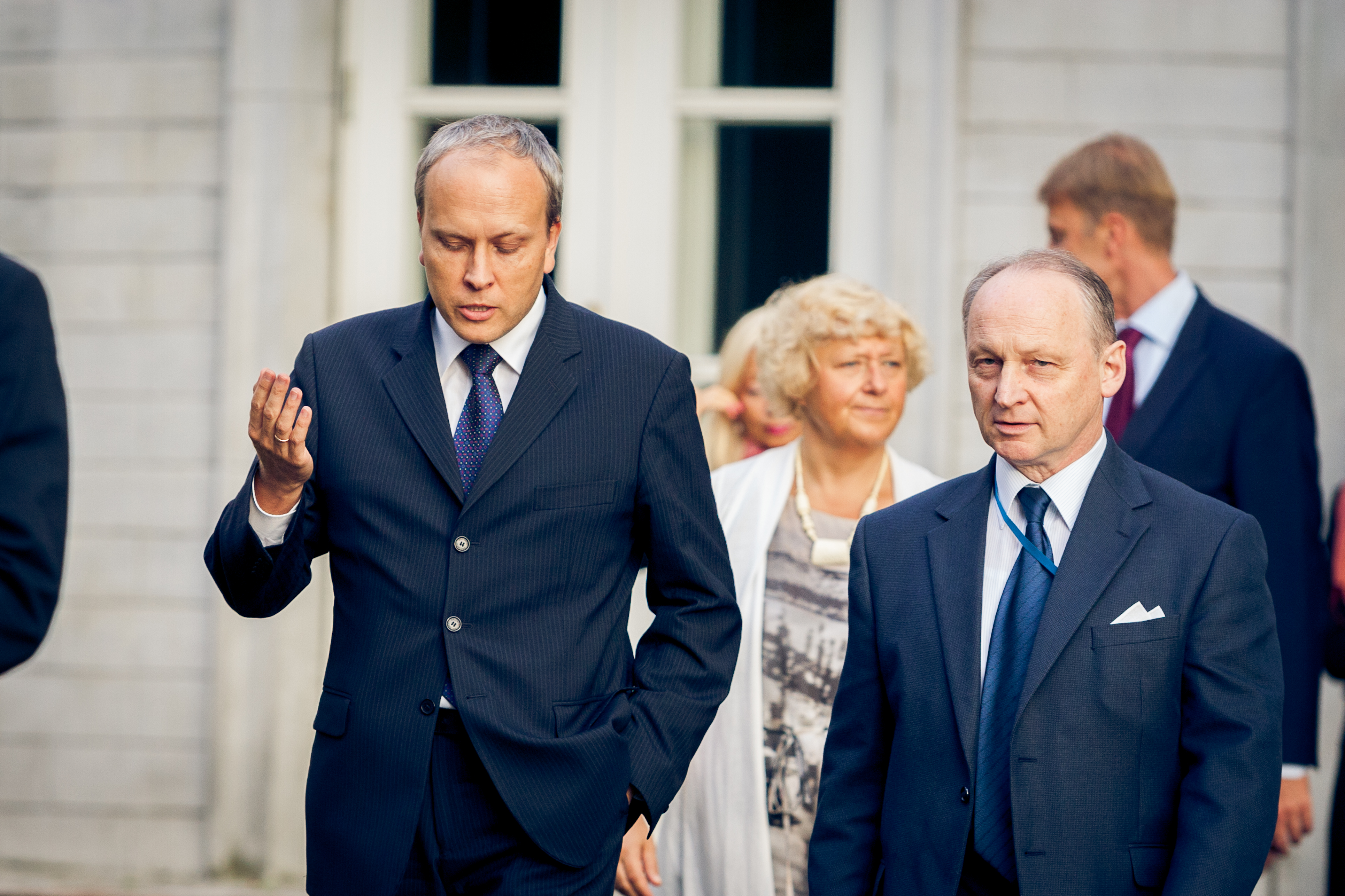 Toomas Kukk (Eesti suursaadik Leedus) ja Toivo Tasa (Eesti suursaadik Jaapanis).